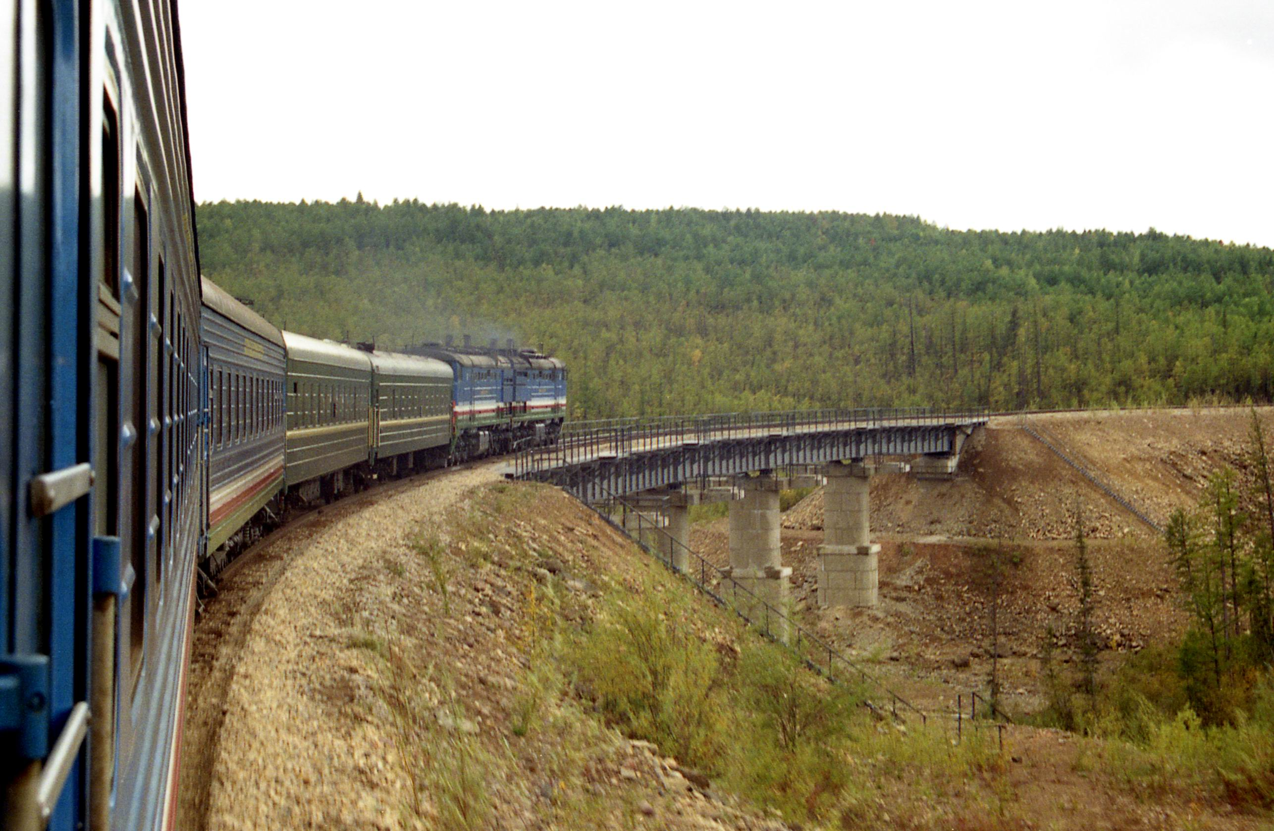 Поезд Томмот - Нерюнгри-пасс.